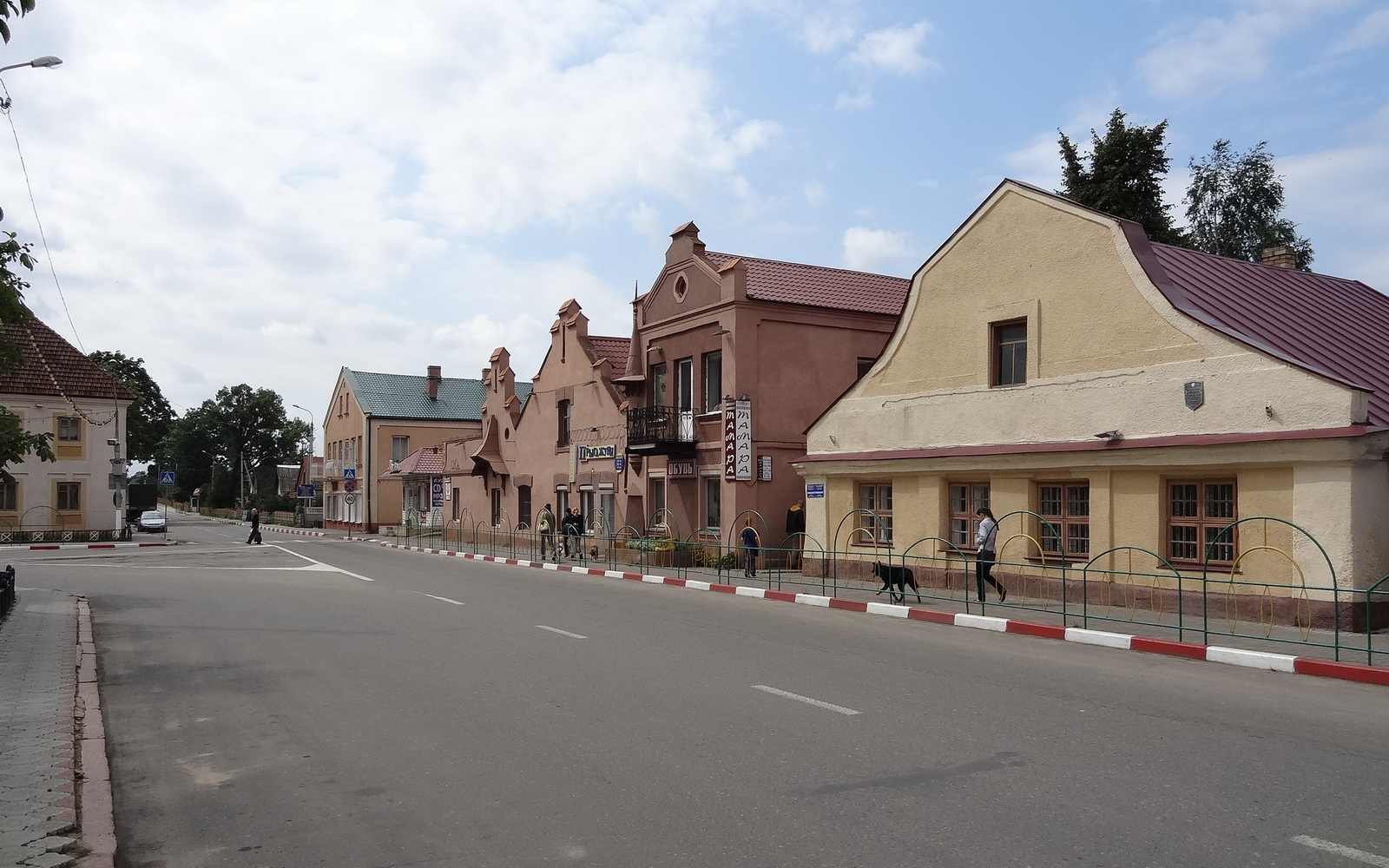 застройка площади Рынок (XVIII век), северная сторона площади